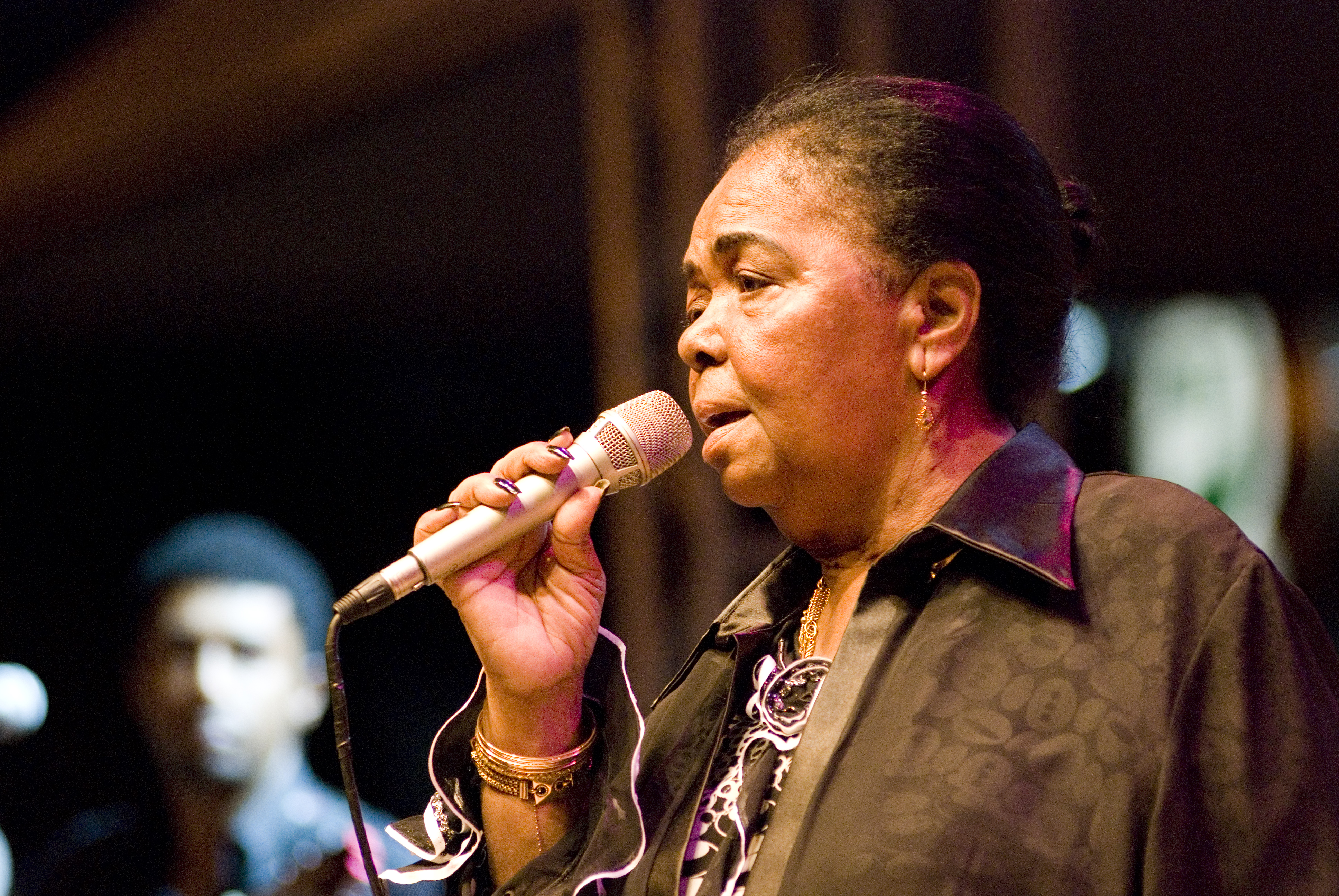 Foto: Silvio Tanaka.